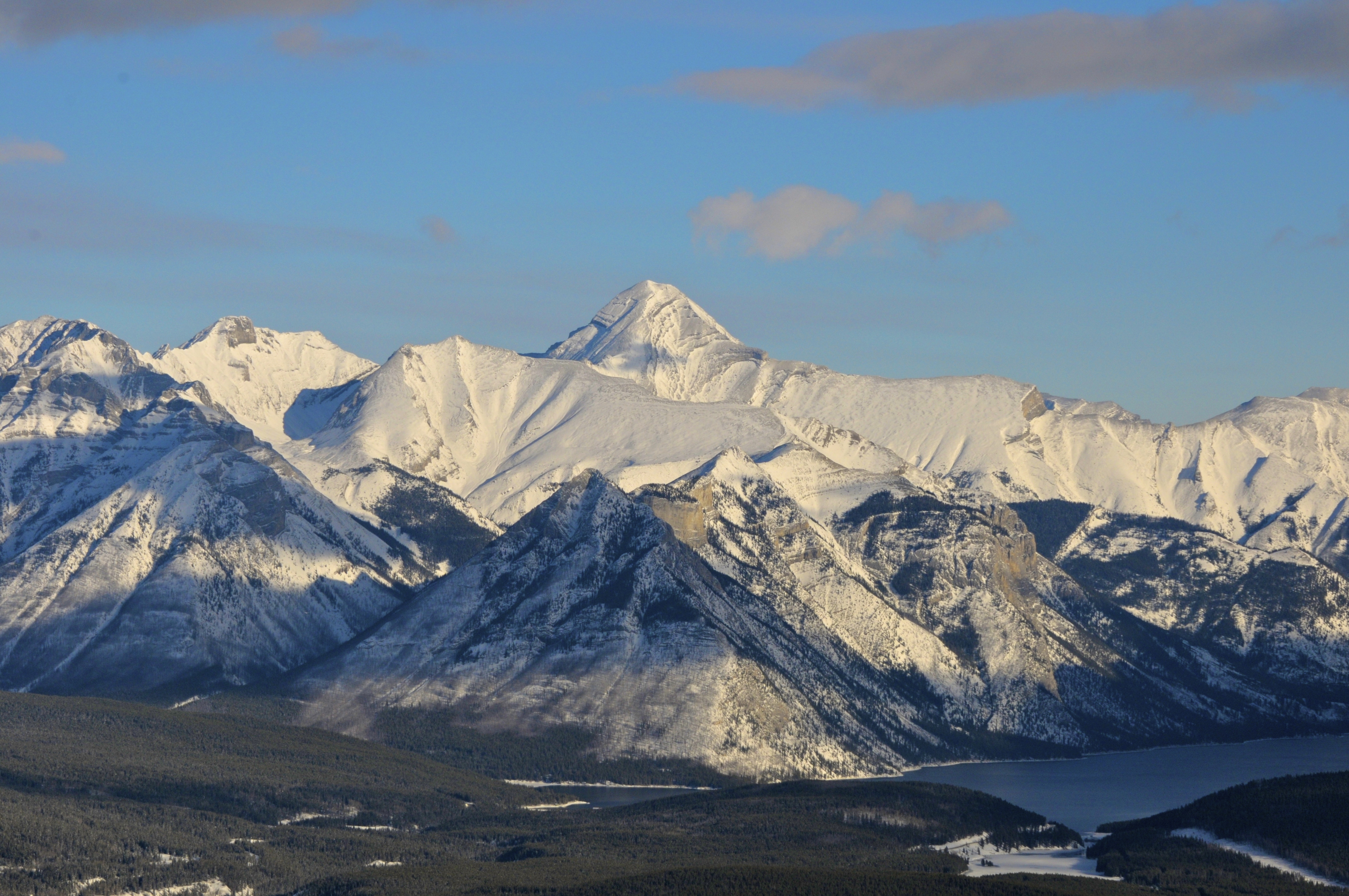 Lake Minnewanka Banff